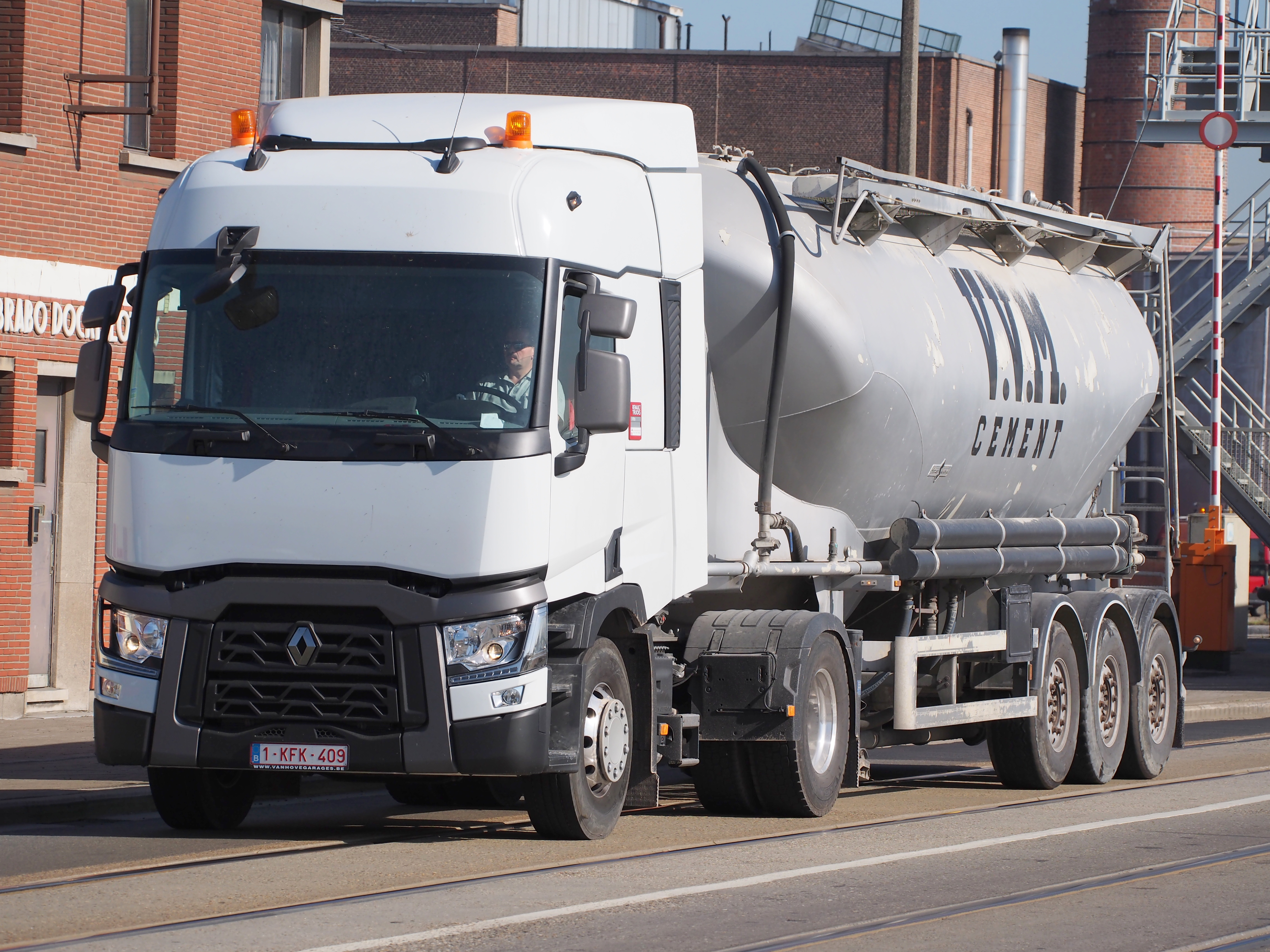 Renault truck VVM Cement.